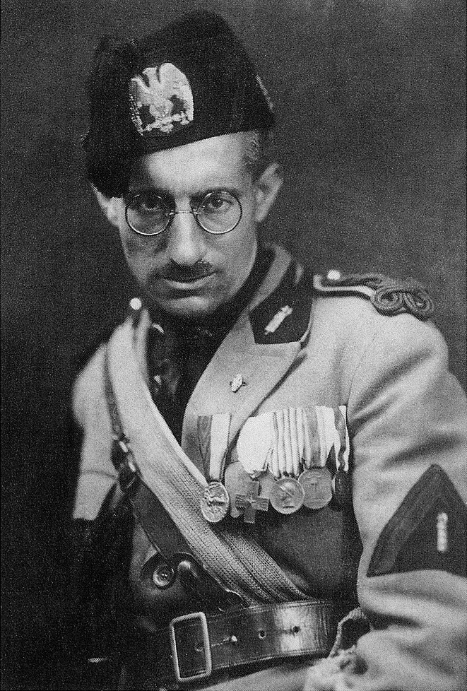 Politico e giornalista italiano. È stato il primo segretario del Partito Nazionale Fascista